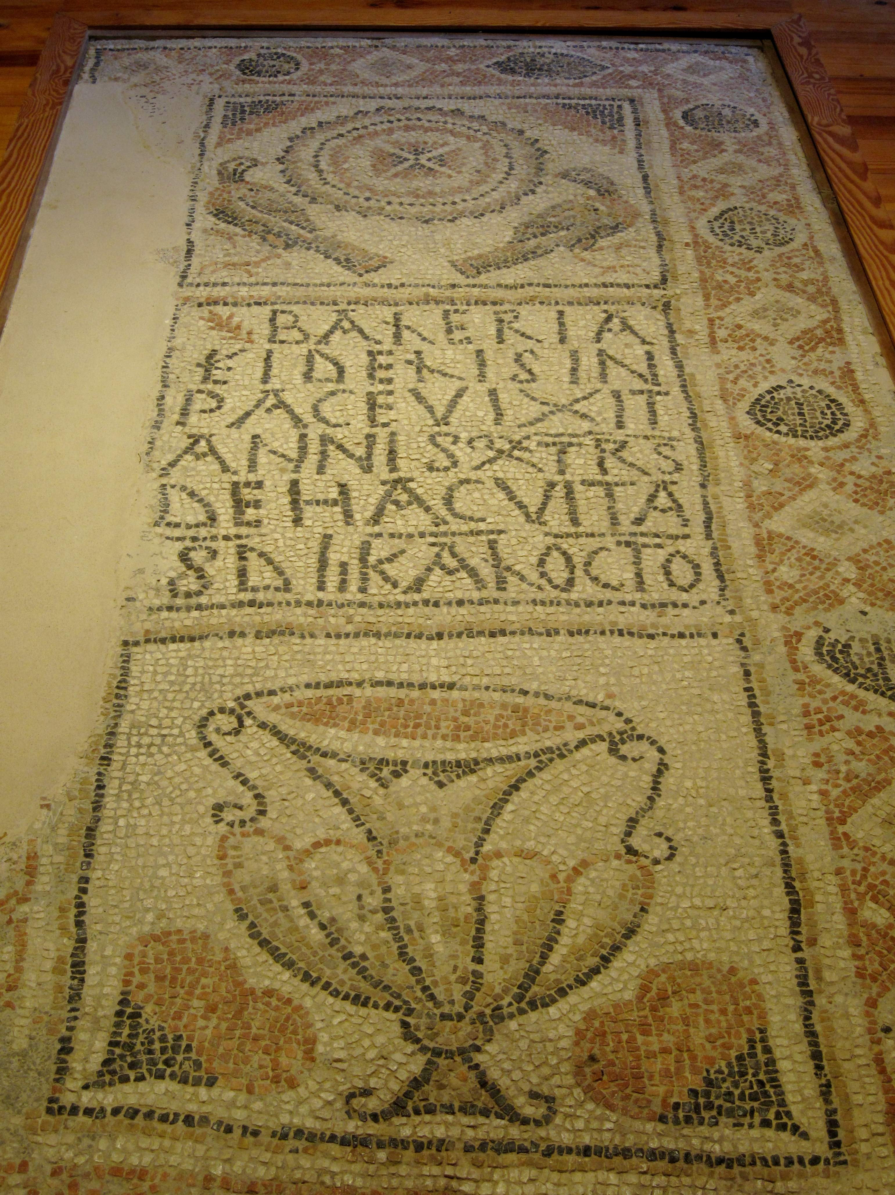 Mosaik mit der Grabschrift der Baleria: BALERIA FIDELIS IN PACE VIXIT ANNIS TRS DE HAC VITA SD II KAL OCTO („Die treue Baleria lebte [...?] Jahre in Frieden. Sie verließ dieses Leben am 2. Kalendertag des Oktober.“), aus der Mitte des 6. Jahrhunderts im Spätantiken Saal des Historischen Museums von Manacor (Museu d’Història de Manacor), Fundort Son Peretó, Gemeinde Manacor, Mallorca, Spanien